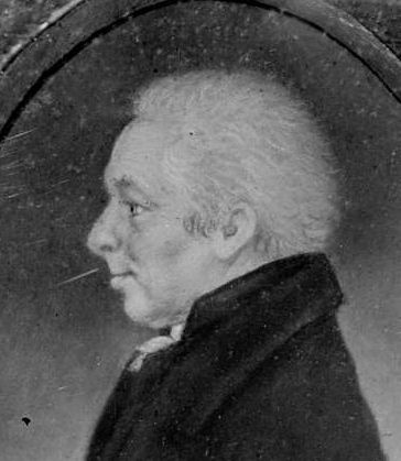 Jasper Ganderheijden (1755-1829), burgemeester van Rossum.